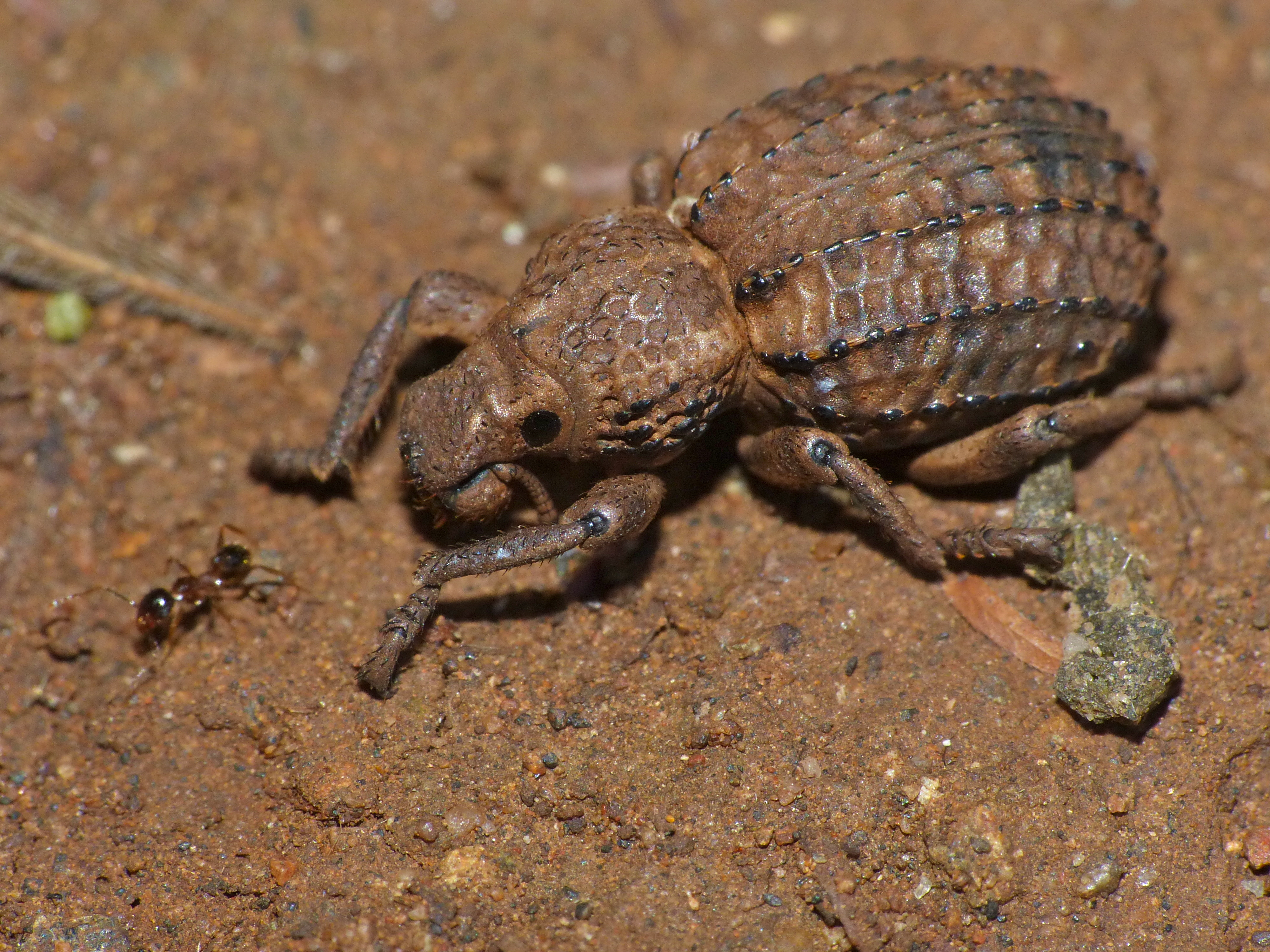 Lower Sabie Camp, Kruger NP, SOUTH AFRICA